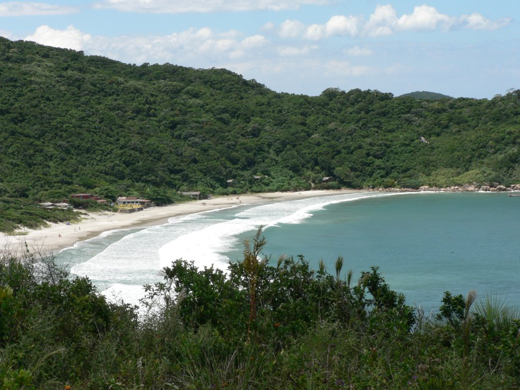 Vista da Praia de Naufragados, a partir do ponto onde estão colocados os canhões.